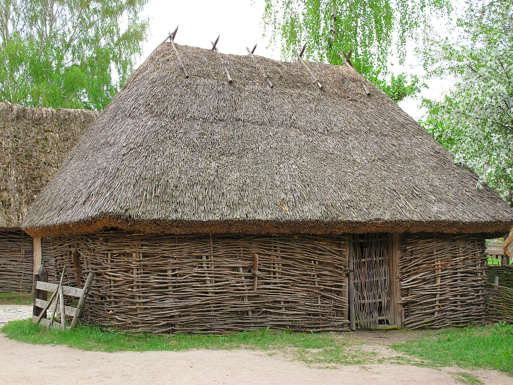 сухоеХРАНИЛИЩЕ